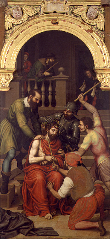 La obra representa el momento en que Jesucristo fue coronado de espinas.